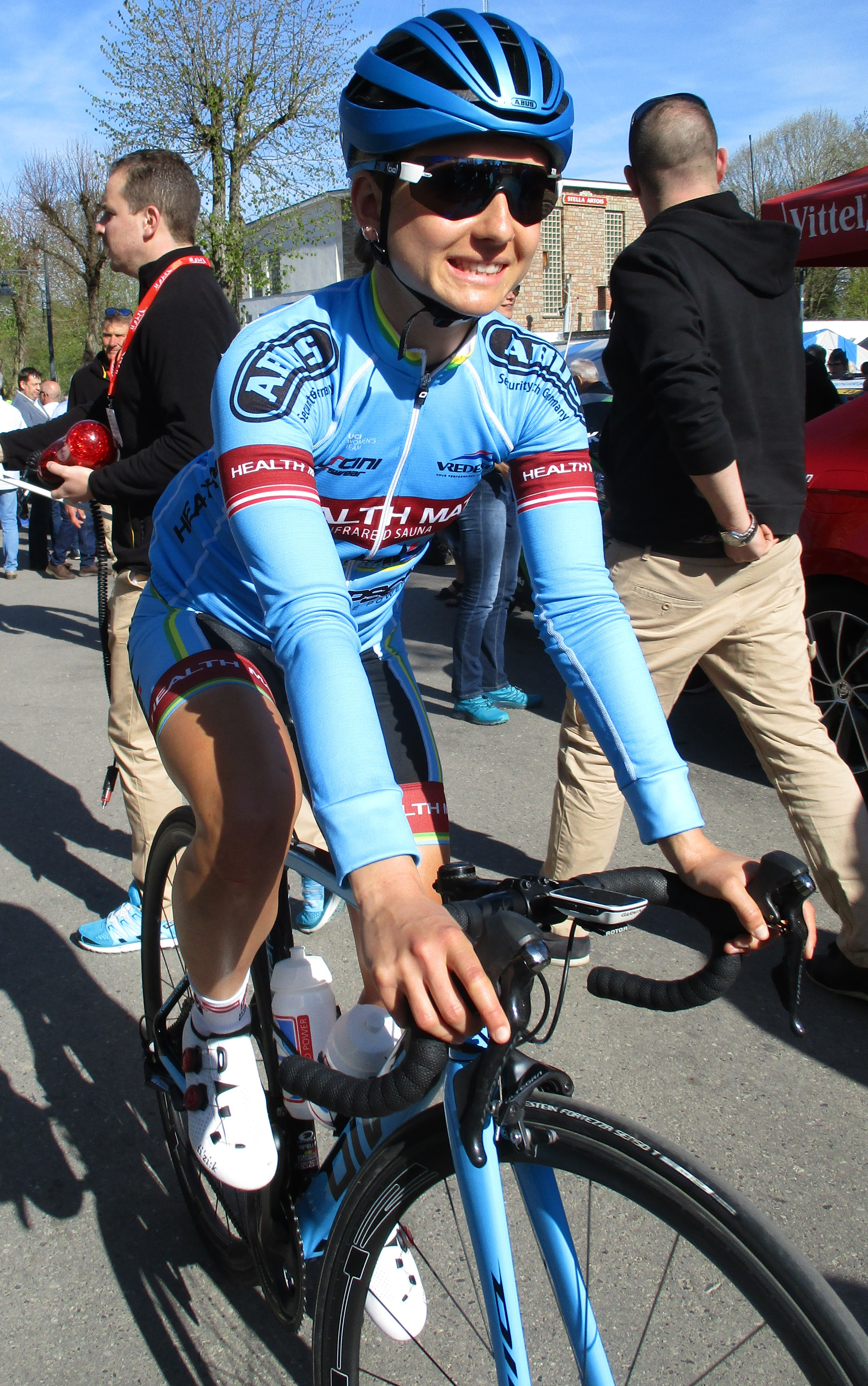 Start van de Waalse Pijl 2018 op de Mur van Huy.